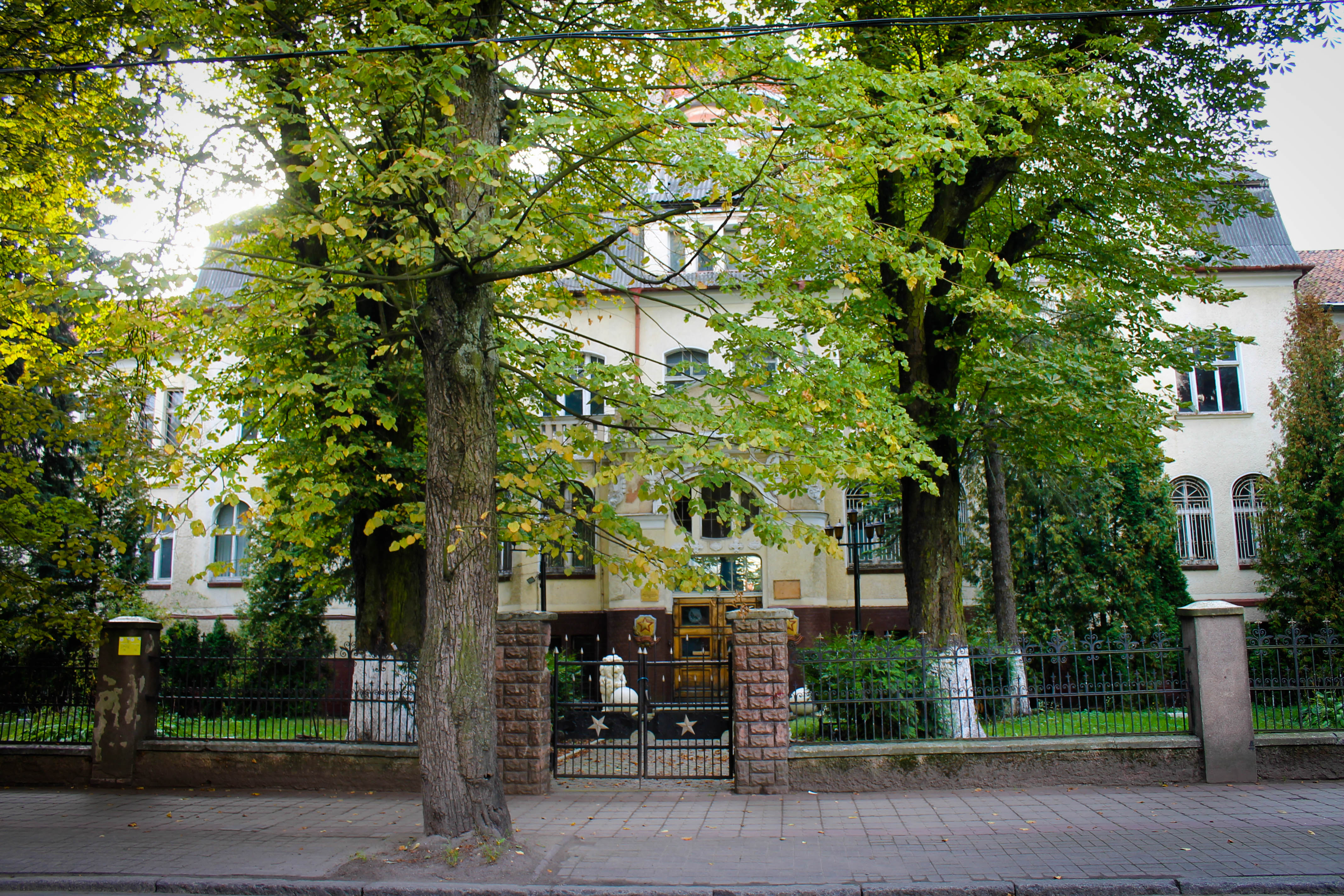 Здание заведения для слепых: улица Комсомольская, 95, Калининград, Калининградская область